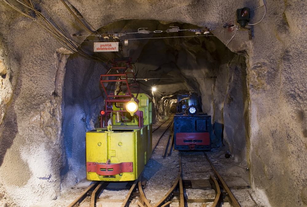 EL30 neben AEG Fahrdrahtlok